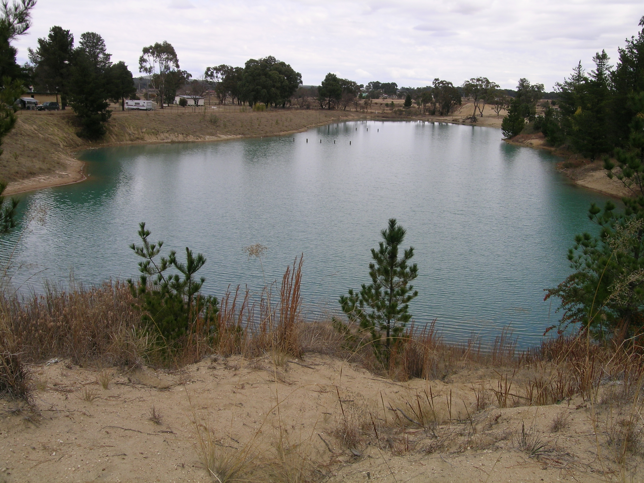 Swimming Hole, Tingha, NSW